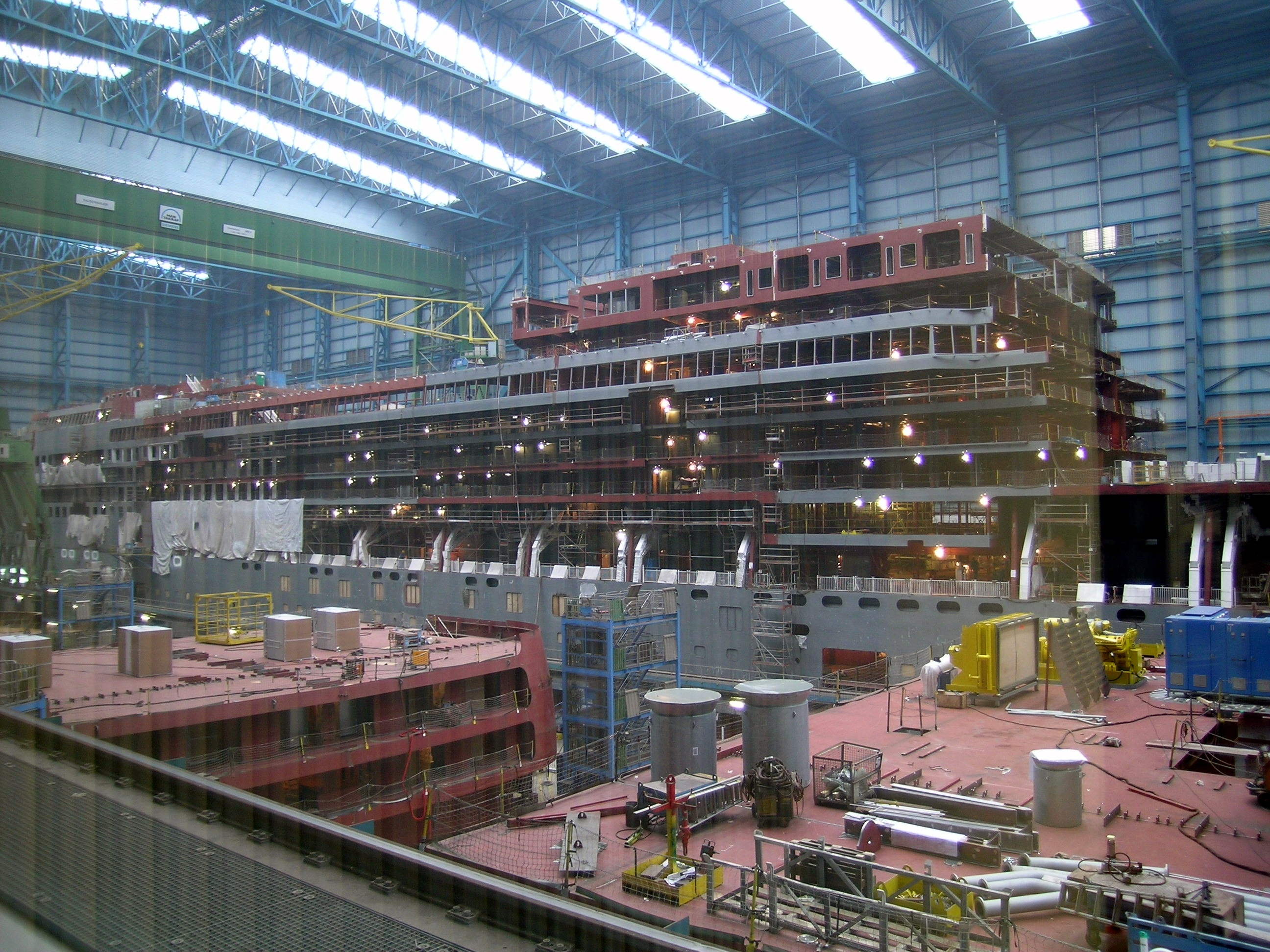 Norwegian Jewel im November 2004 auf Dock in der Meyer Werft, Papenburg